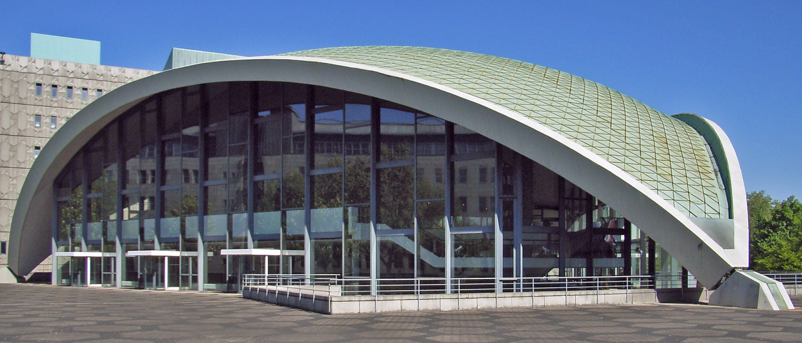 Operenhaus Dortmund.